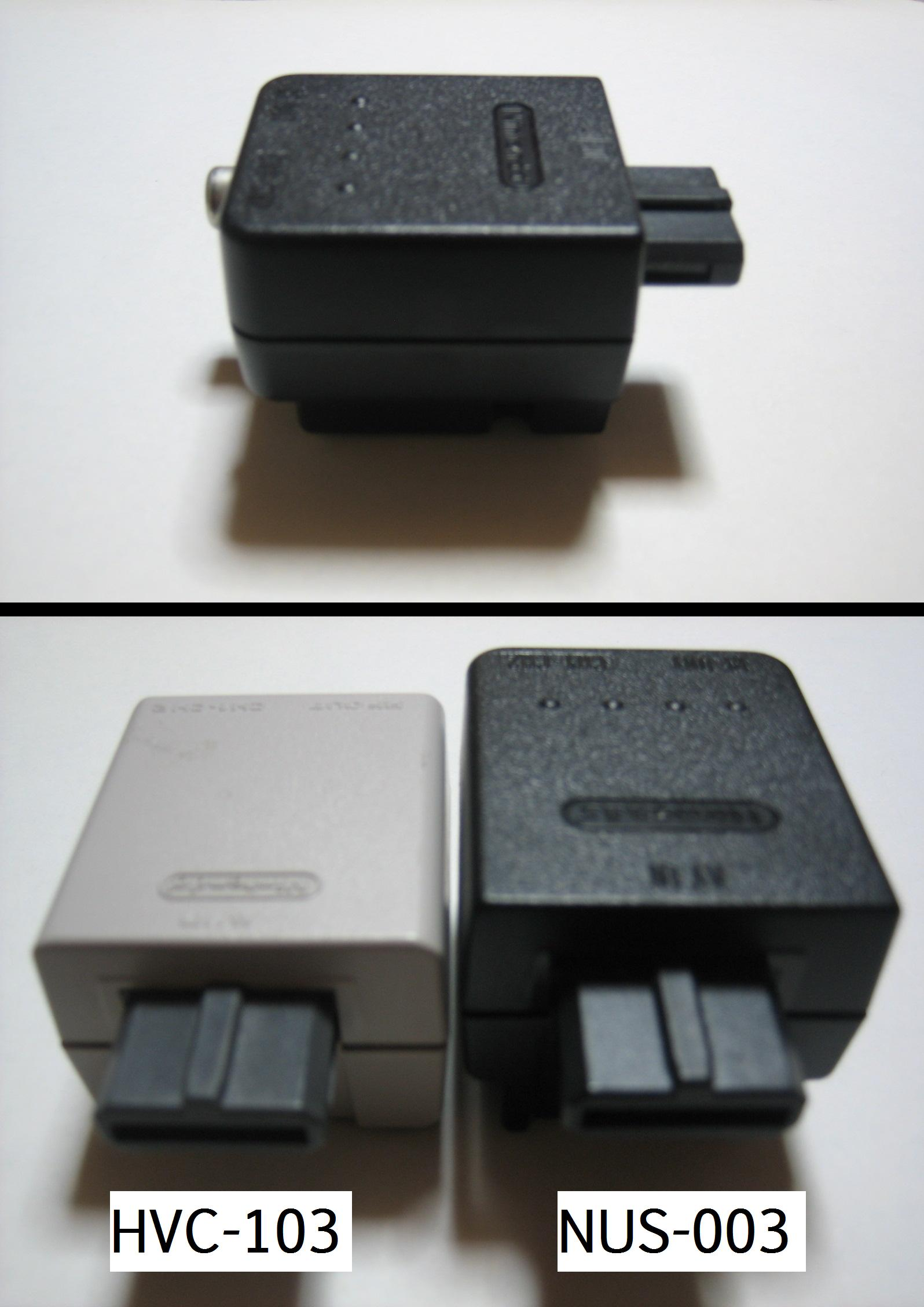 nintendo64_nus-003